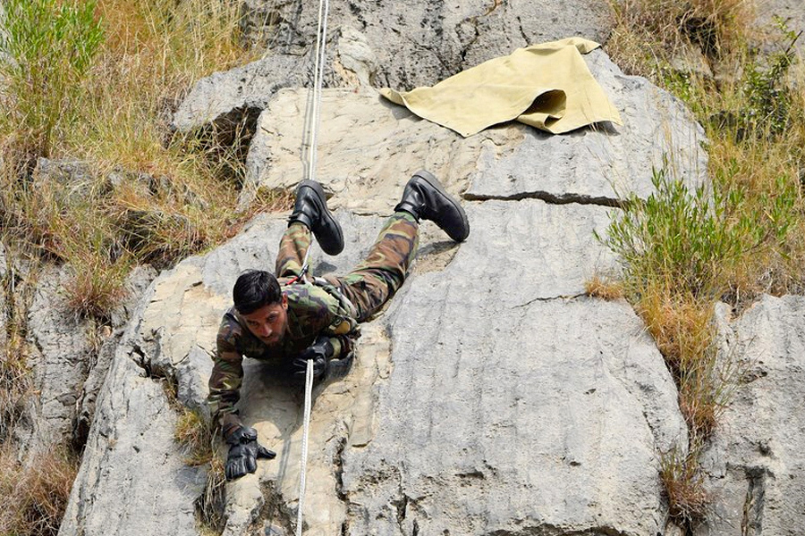 Первая совместная тренировка по горной подготовке в рамках российско-пакистанского тактического учения «Дружба-2016»